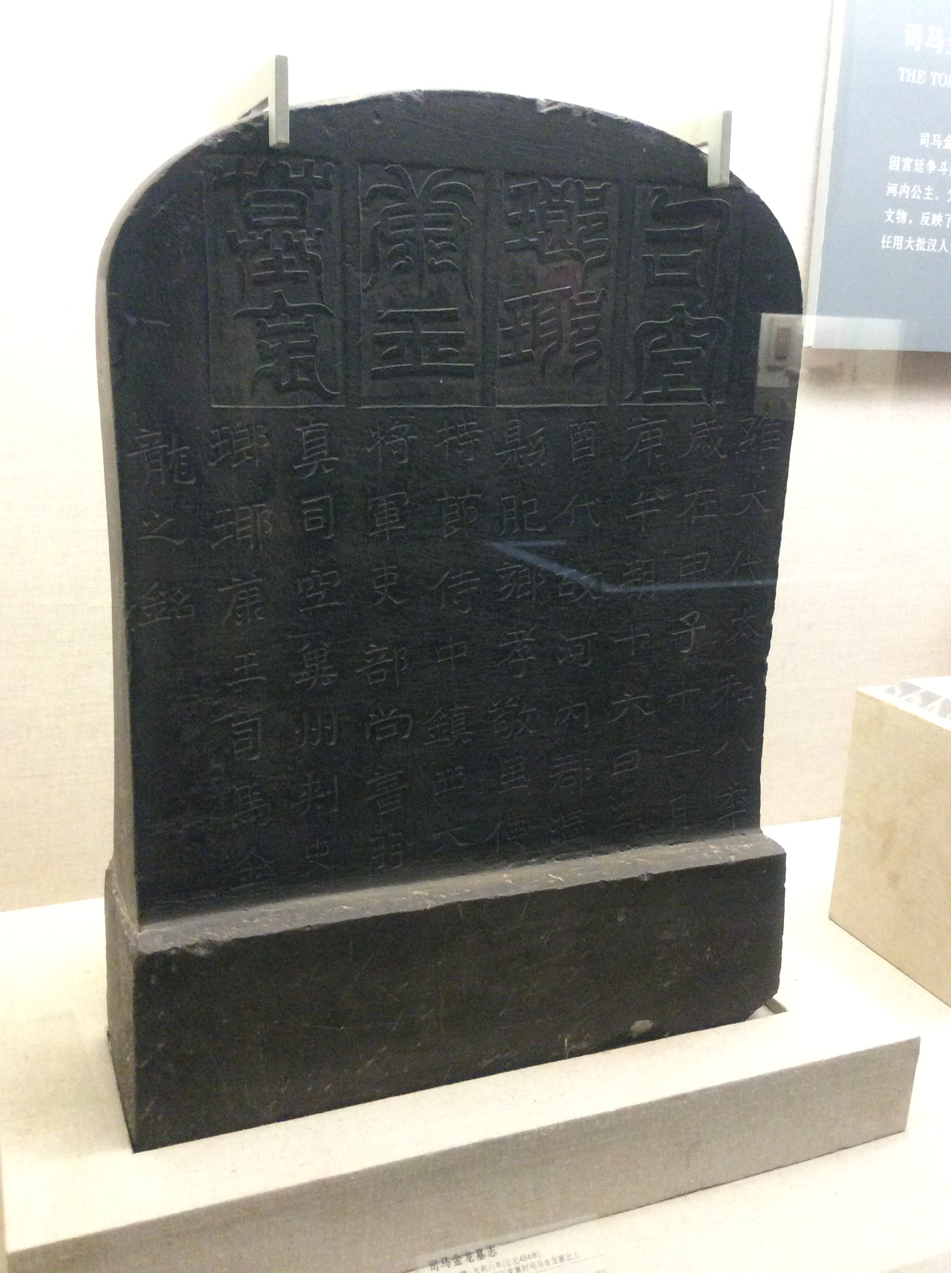 司馬金龍墓誌 北魏, 山西大同市石家寨村司馬金龍墓出土